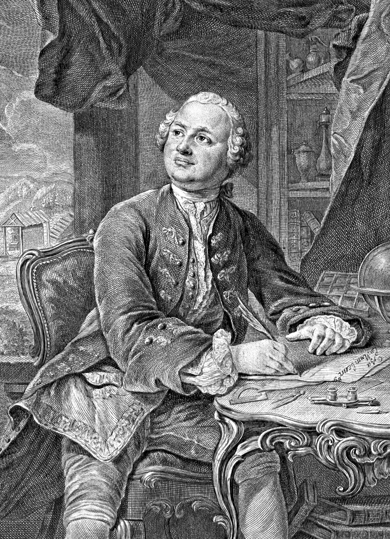 М.В.Ломоносов. Прижизненное изображение. Бумага, гравюра резцом. Э.Фессар и К.А.Вортман. 1757 г. Вортман Христиан-Альберт (Альбрехт) Wortmann Christian-Albert (1680, Померания – 1760, Санкт-Петербург) Фессар Этьен Fessard Etienne (1714, Париж - 1777, Париж) Под изображением надпись: Московской здѣсь Парнассъ изобразилъ витїю, Что чистой слогъ стиховъ и прозы ввелъ в Россiю. Что въ Римѣ Цицеронъ и что Виргилїй былъ, То онъ одинъ въ своемъ понятїи вместилъ, Открылъ натуры храмъ богатымъ словомъ Россовъ Пример ихъ остроты въ наукахъ Ломоносовъ. Из: Ровинский Д. А. Подробный словарь русских гравированных портретов. СПб., 1886 - 1889. Т. 2, стб. 1198-1199, №1; Морозов А.В. Каталог моего собрания русских гравированных и литографированных портретов. М., 1912. Т. 1, стб. 656. Из изд.: Ломоносов М. В. Собрание разных сочинений в стихах и прозе господина коллежского советника и профессора Михаила Ломоносова. 2-е изд. с добавлениями. Кн. 1. М., 1757. Стихи под портретом предположительно принадлежат перу Н. Н. Поповского. Источник: Каталог художественных произведений с изображениями Михаила Васильевича Ломоносова из собрания Московского университета. / Сост. Е.В.Зименко, Г.А.Широкова. Под ред. А.П.Лободанова. — М.: Издательство Московского университета, 2011. — 88 с.